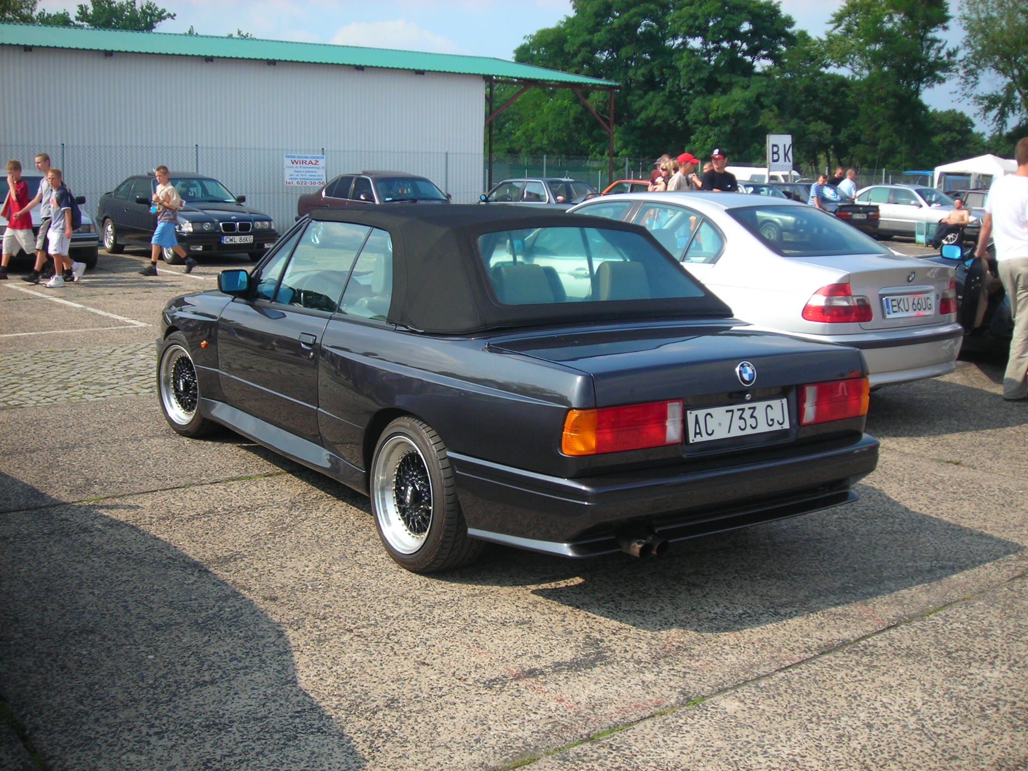 BMW M3 e30 cabrio, wyprodukowany 1991-04. Zlot BMW M Power Club w Toruniu.